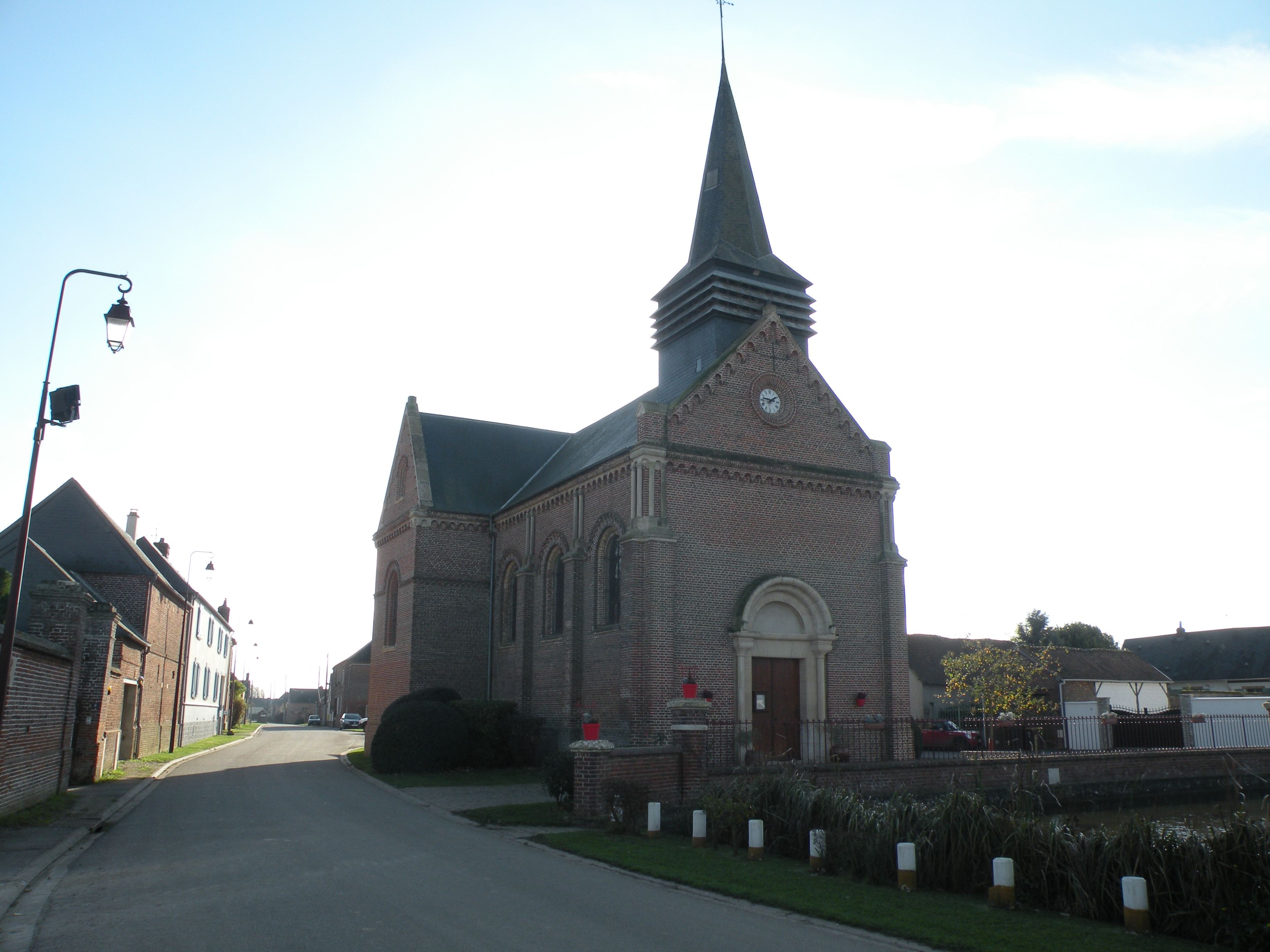 église Saint-Prix de Maisoncelle-Saint-Pierre